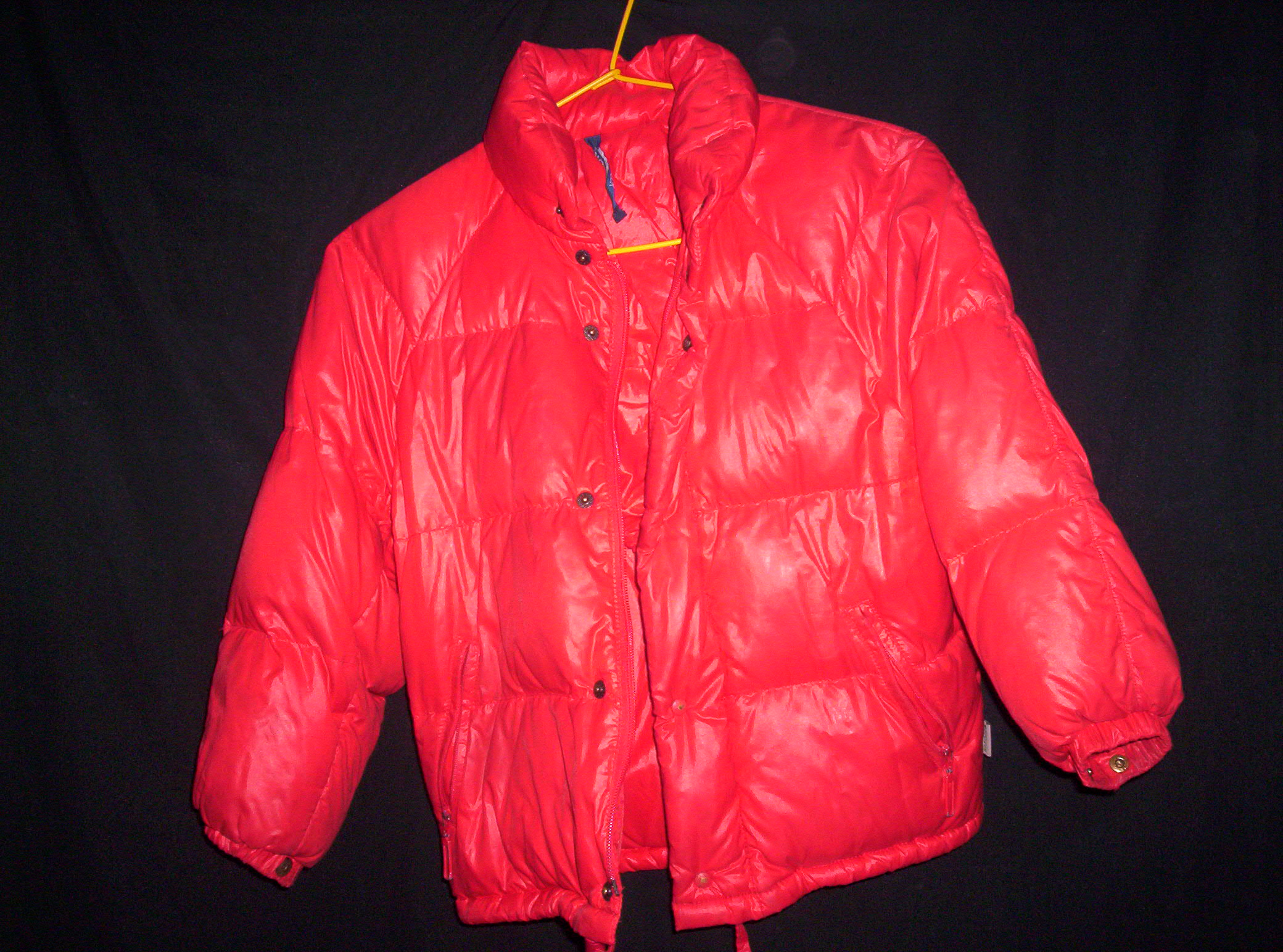 Anorak01.jpg